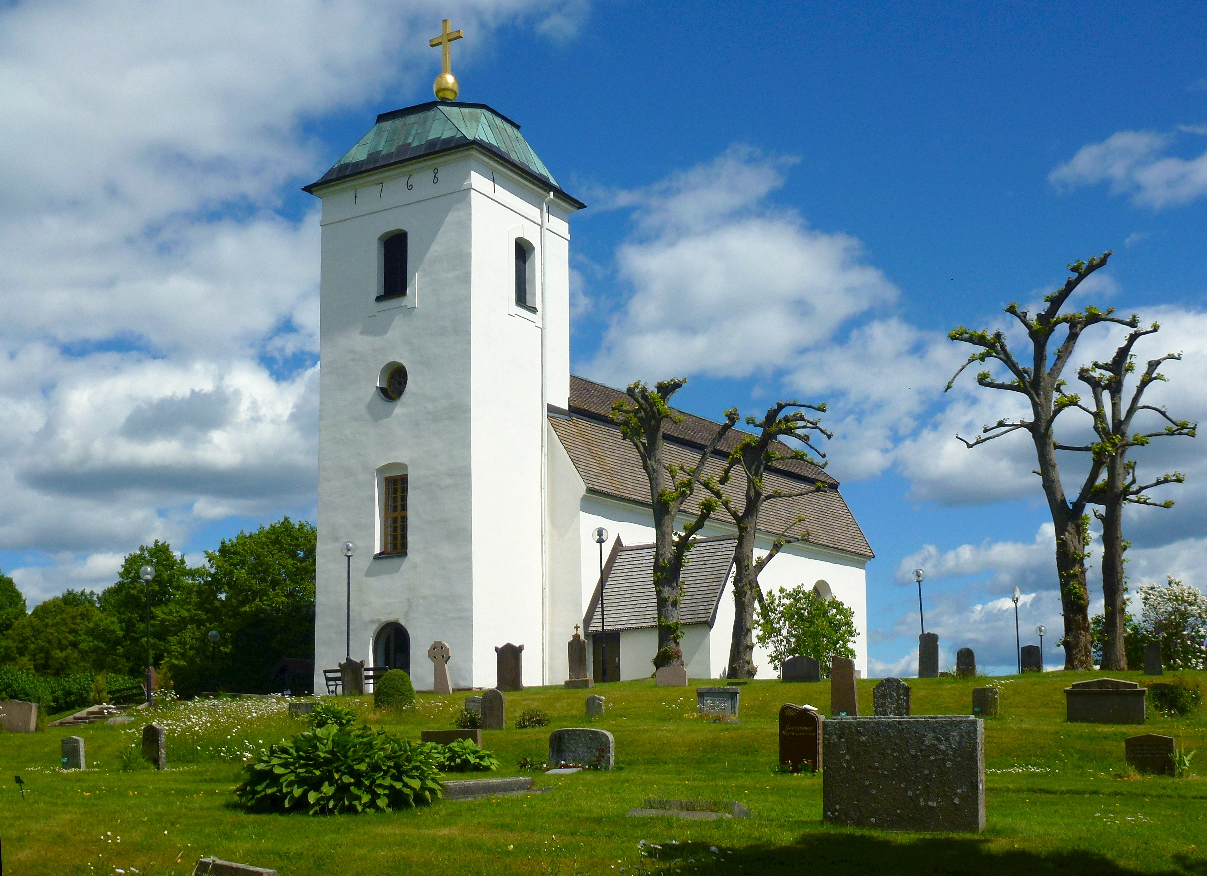 Eds kyrka Uppland